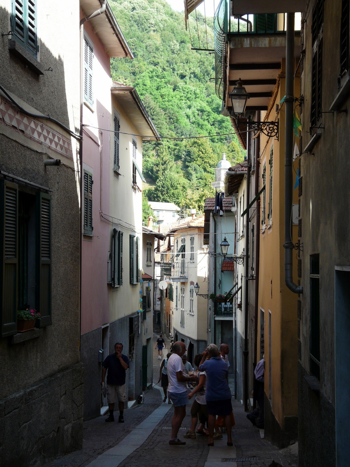 Centro storico di Crocefieschi, Liguria, Italia